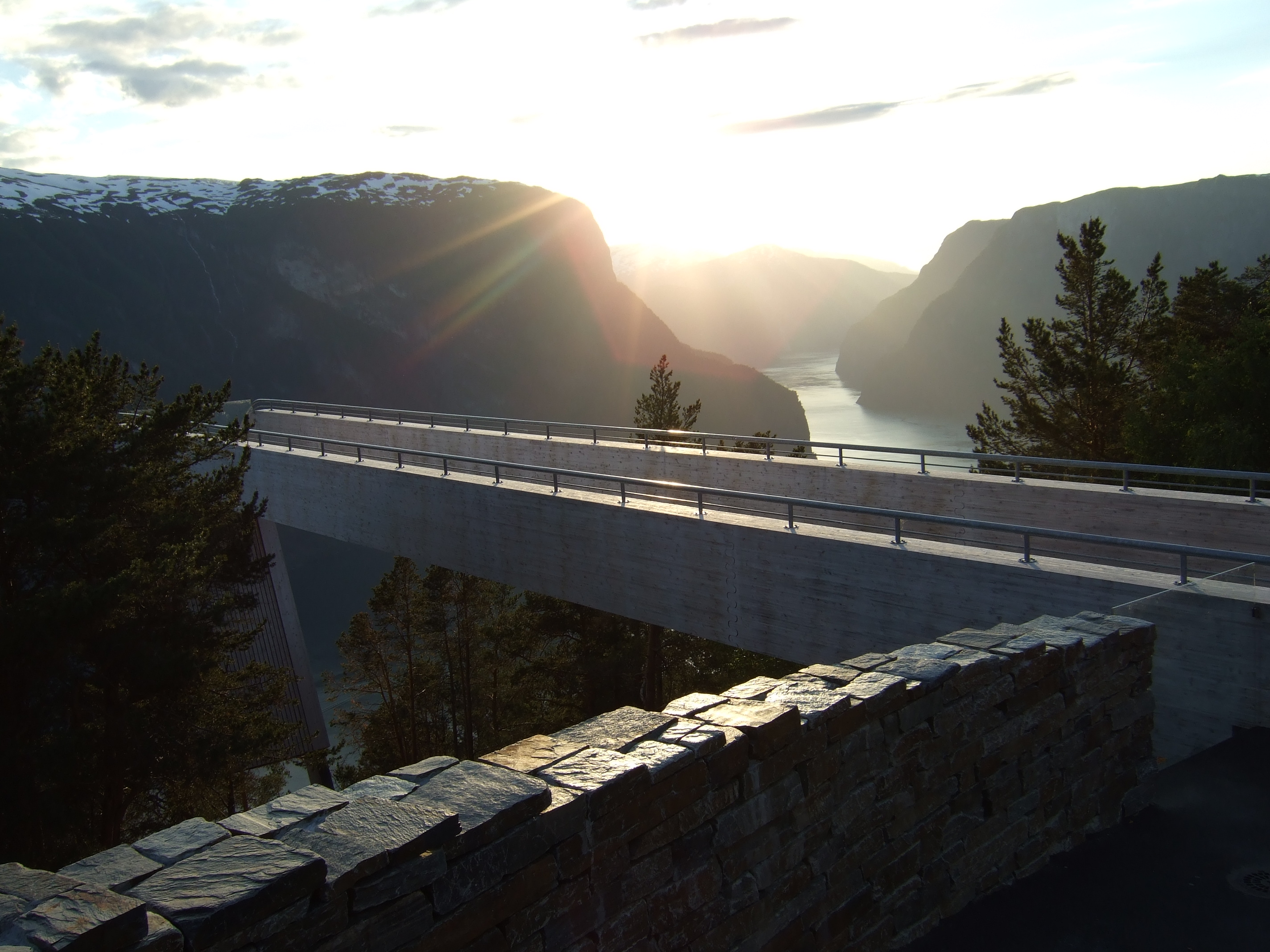 Stegastein outlook and Aurlandsfjord in Norway